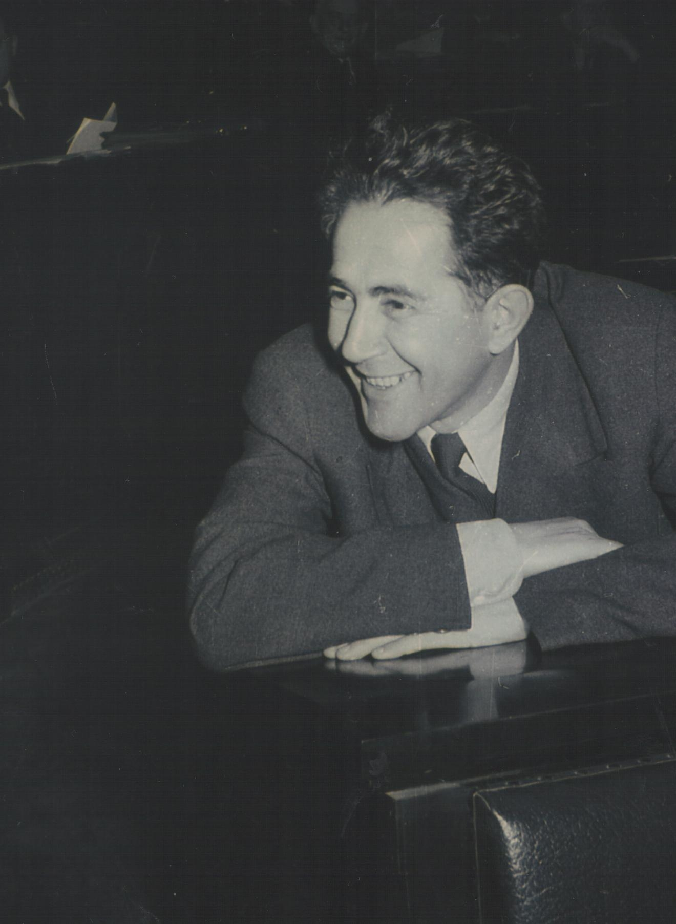 Milovan Đilas, 1950.foto: Stevan Kragujević (po odobrenju kćerke Tanje Kragujević)